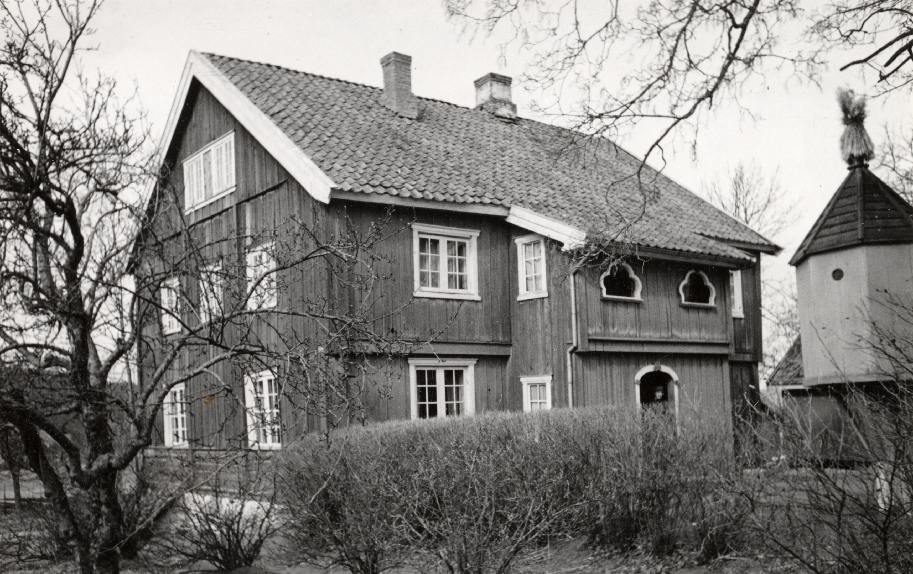 Granavolden Søndre, Gregersstua i Gran, Oppland